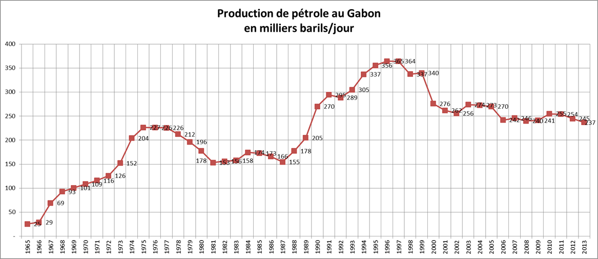 Graphique production de pétrole au Gabon entre 1965 et 2013 (milliers de barils par jour) BP statistics